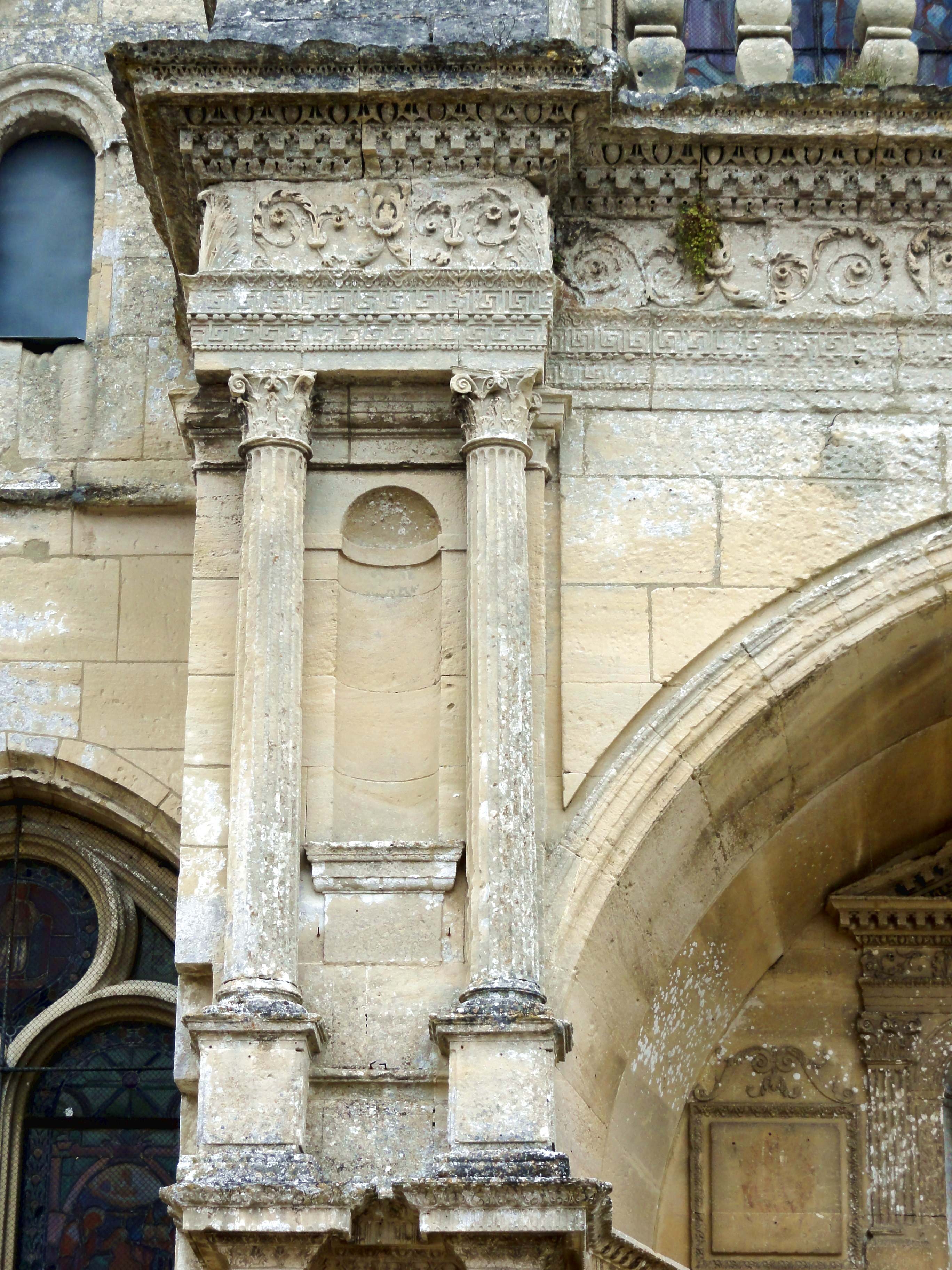 Église Saint-Gervais-et-Saint-Protais de Saint-Gervais (voir titre).